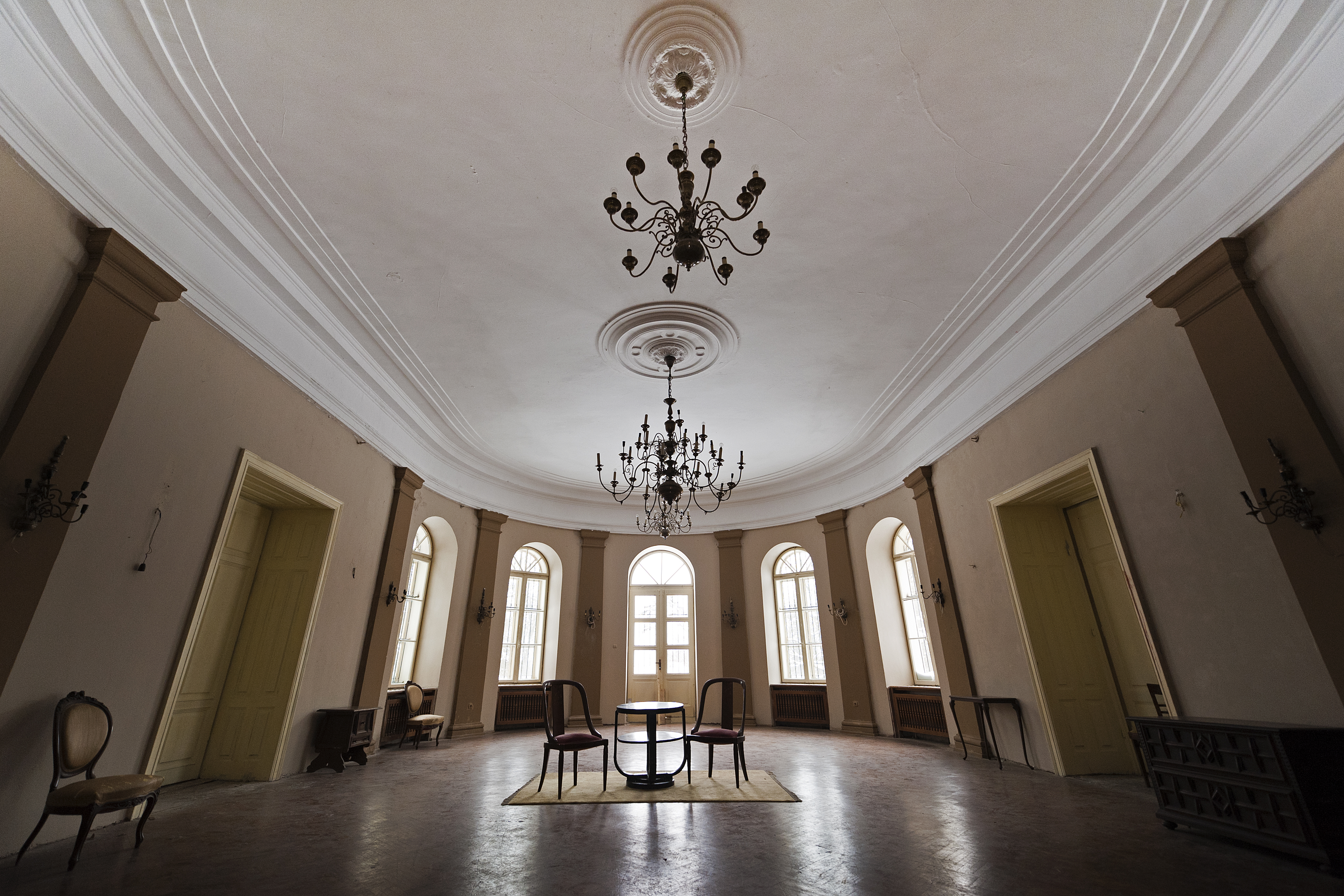 Ansamblul fostului palat Alexandru Ghica